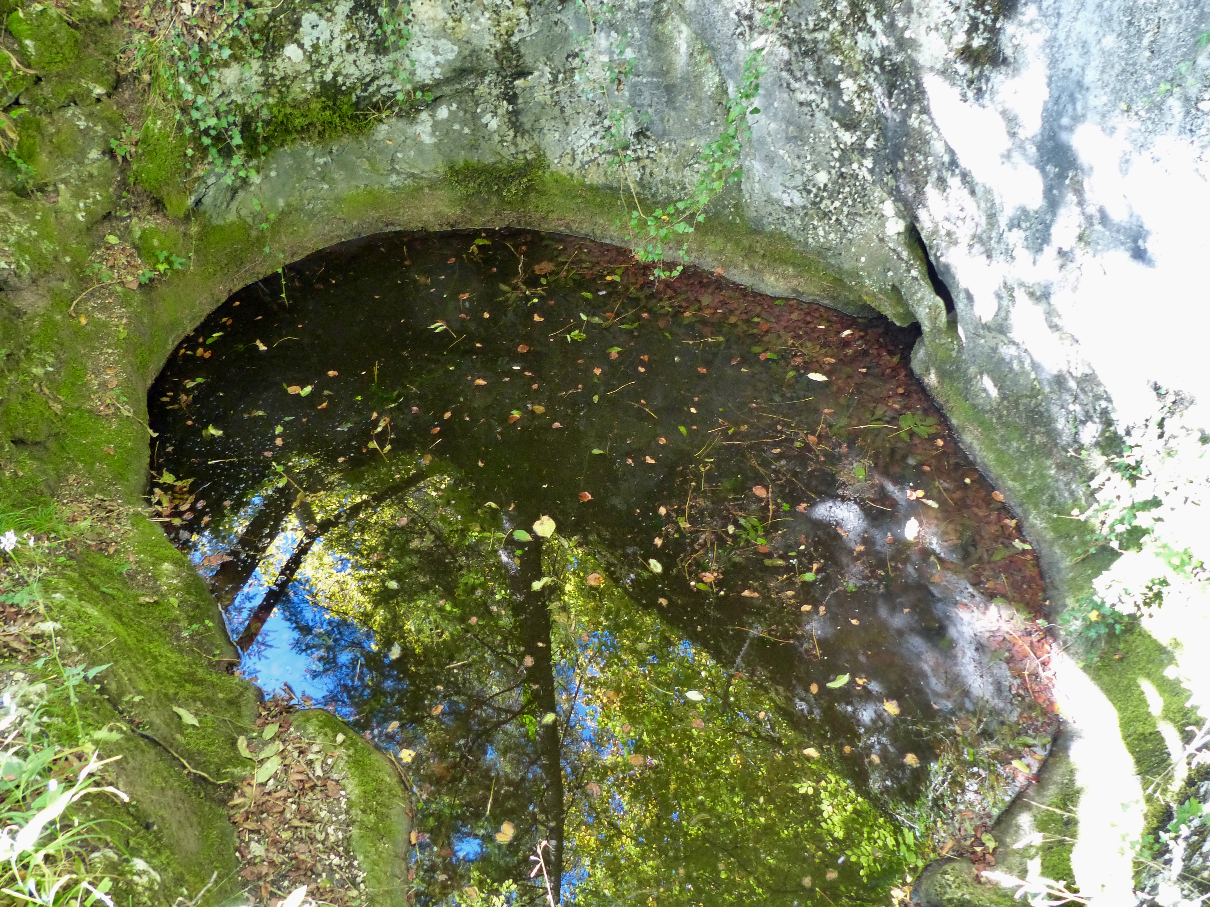 Geotop im Landkreis Berchtesgadner Land: Gletschertöpfe Kälberstein